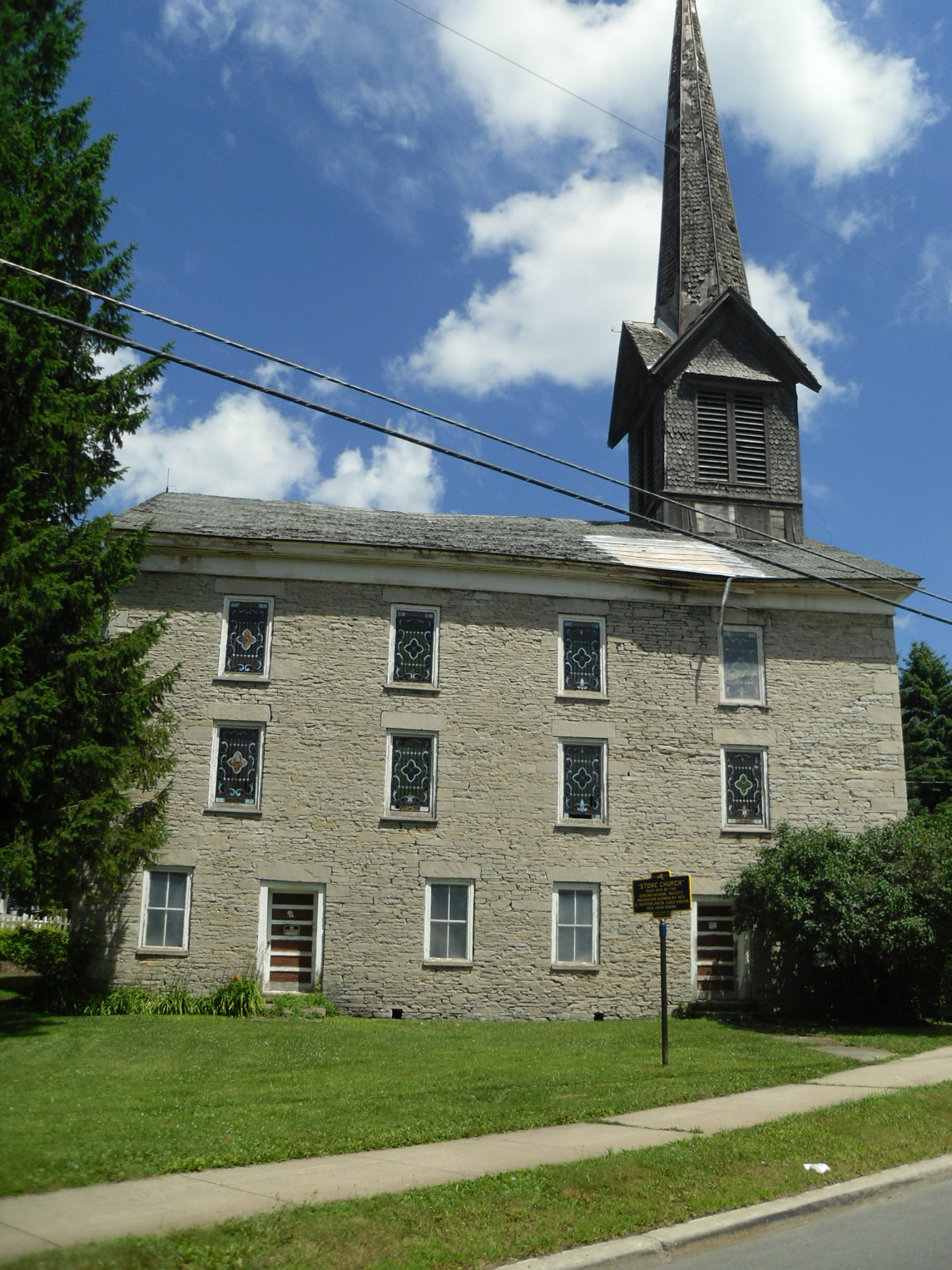 Oriskany Falls, New York